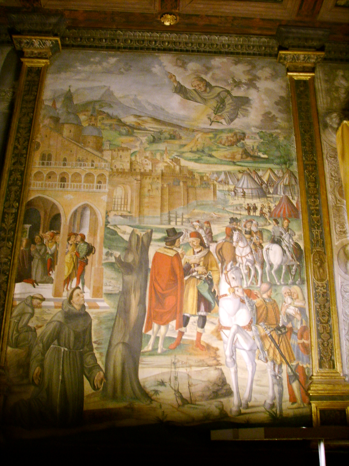 Filippo da Verona, Sant'Antonio appare al beato Lucca Belludi predicendogli l'immediata liberazione di Padova dal dominio di Ezzelino.